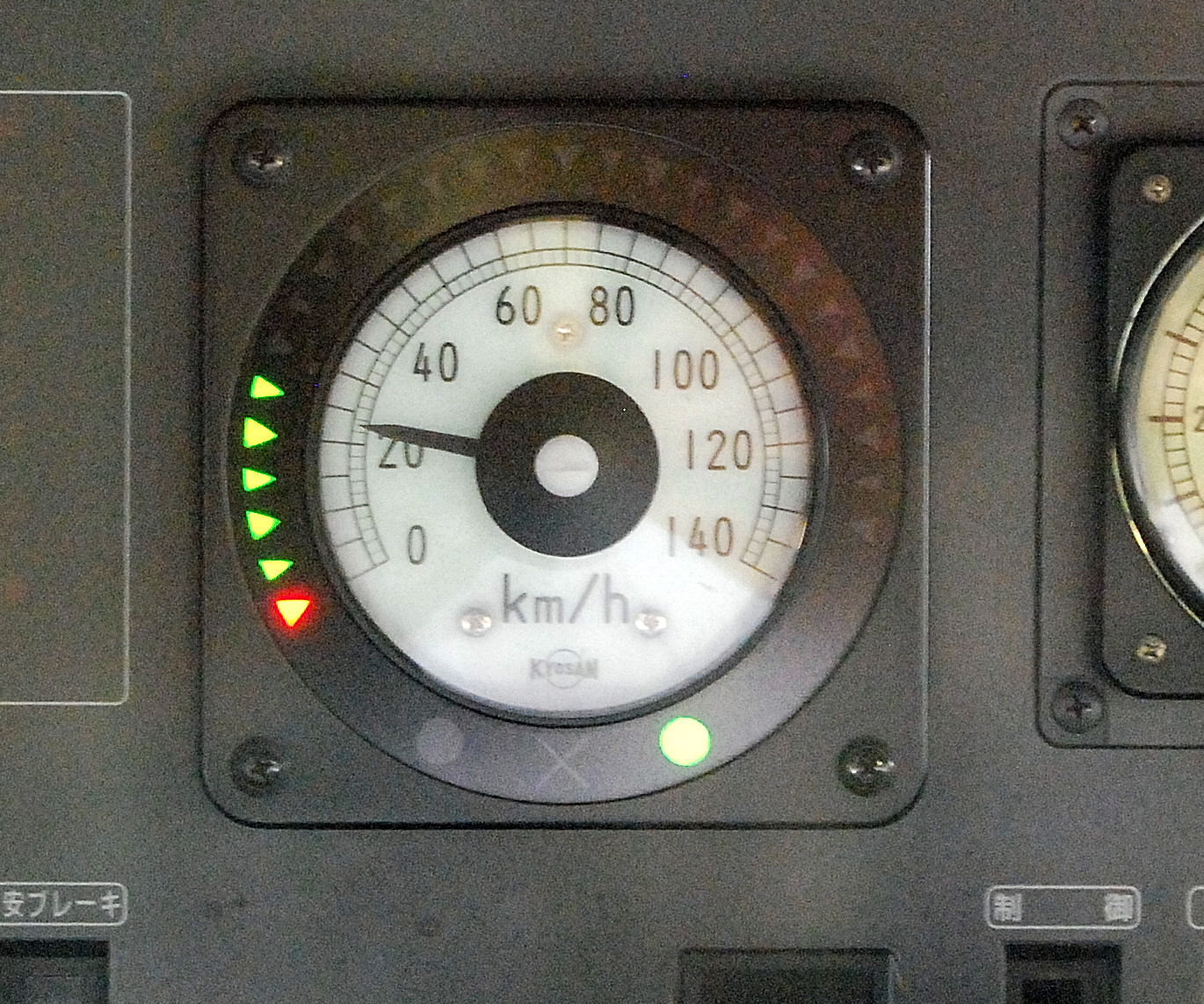 京王ATCの車内信号（乗務員室の窓越しから撮影後トリミング）